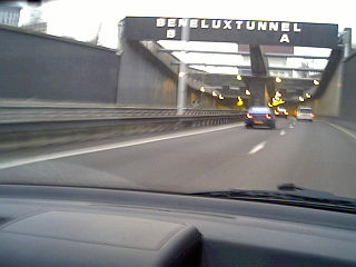 Benuluxtunnel. januari 2005. De oude tunnelbuis, ingang noordkant. Eigen werk.